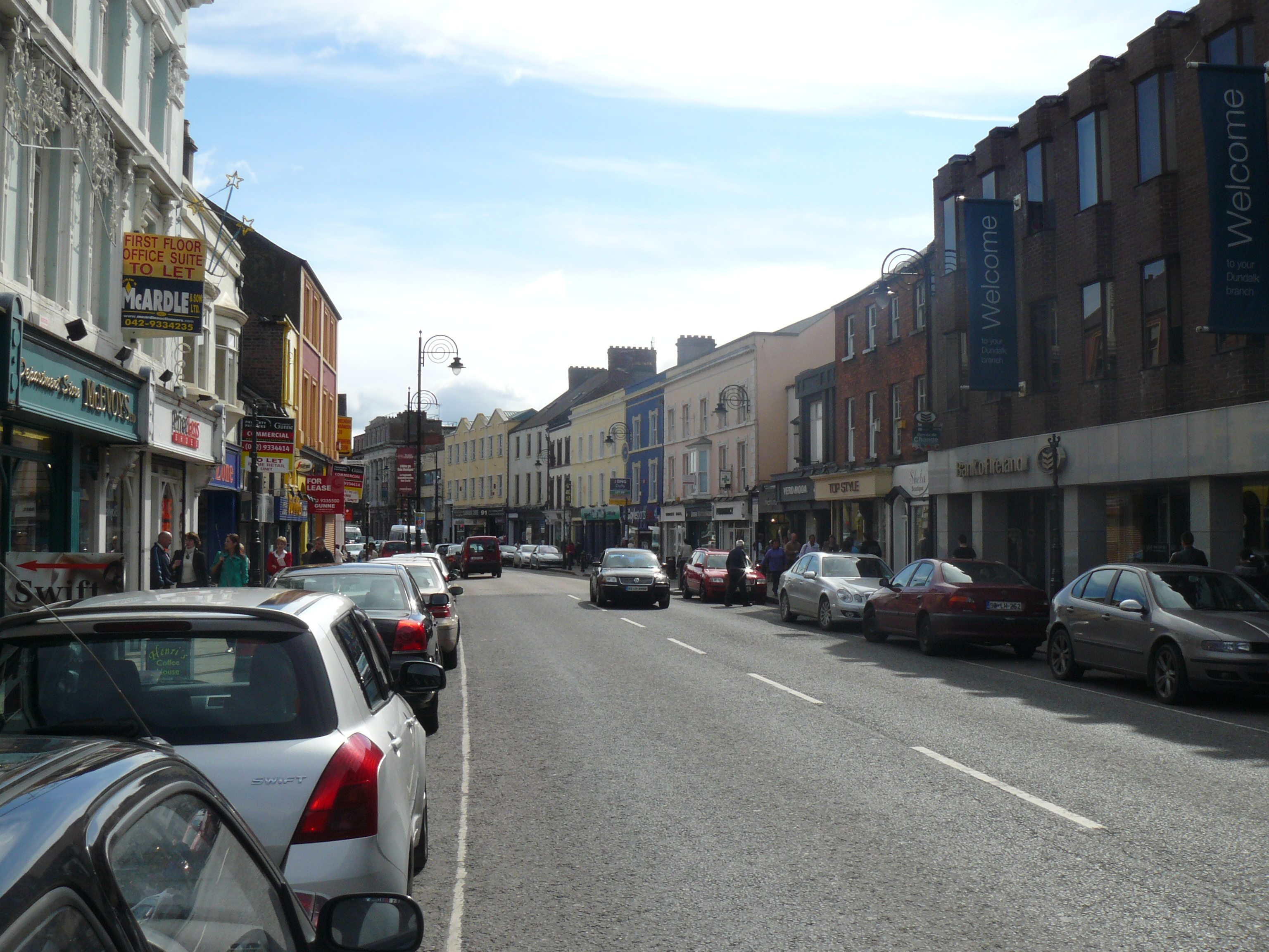 Dundalk